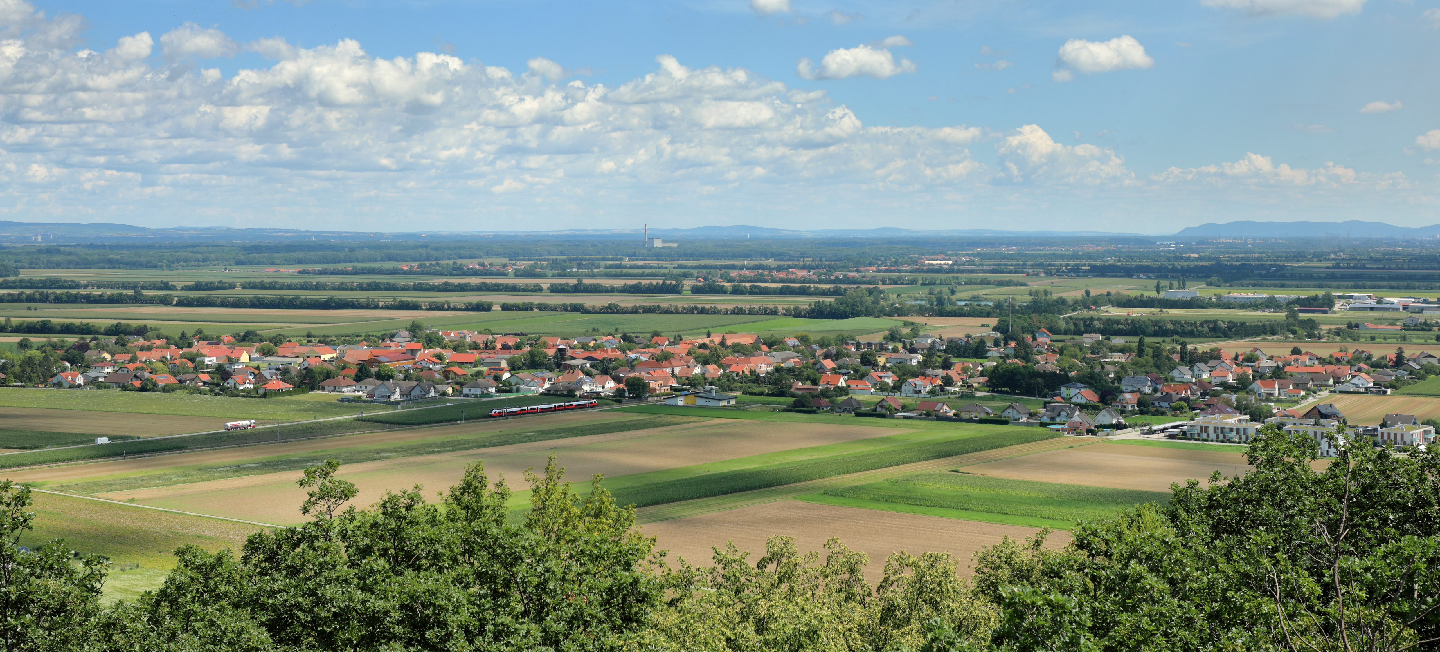 Blick vom Aussichtsturm „Korkenzieher“ auf das niederösterreichische Dorf Gemeinlebarn, das zur politischen Stadtgemeinde Traismauer gehört.